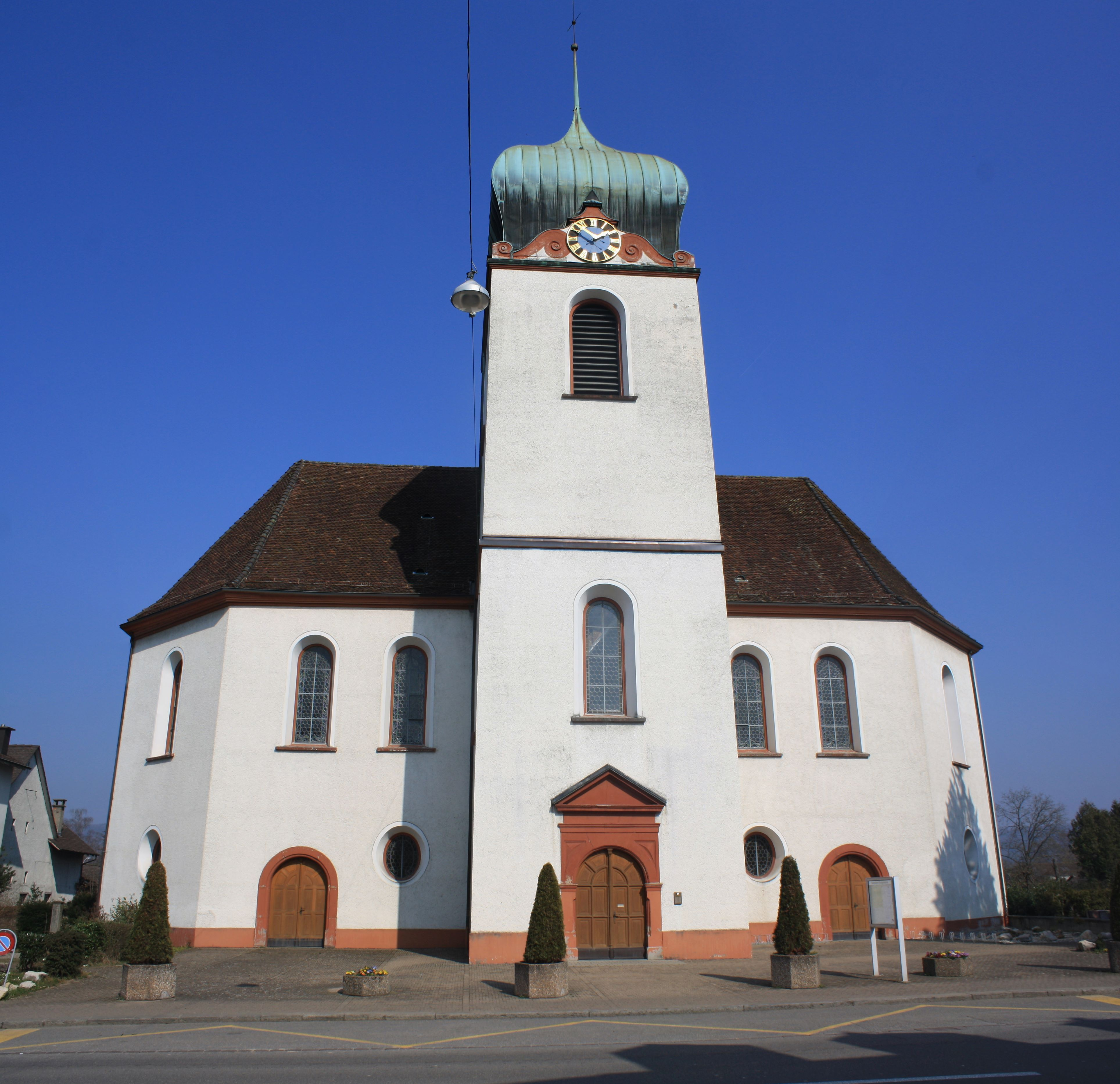 Reformierte Kirche, Bad Zurzach